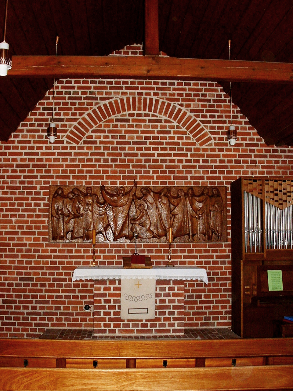 Evangelische Kirche Hochscheid im Hunsrück